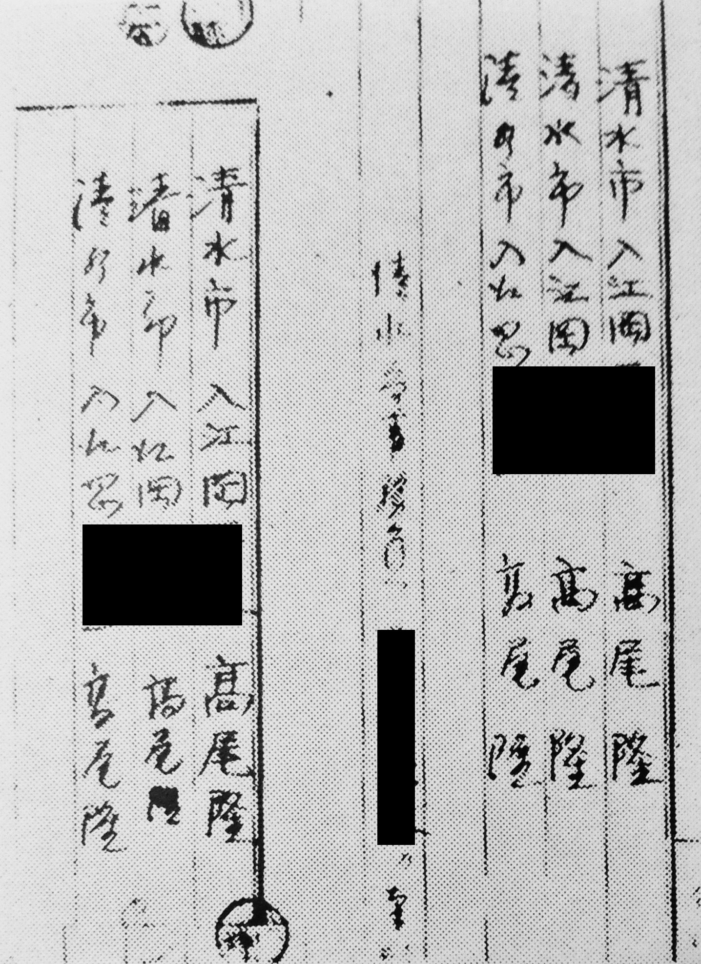 清水局事件における容疑者の筆跡